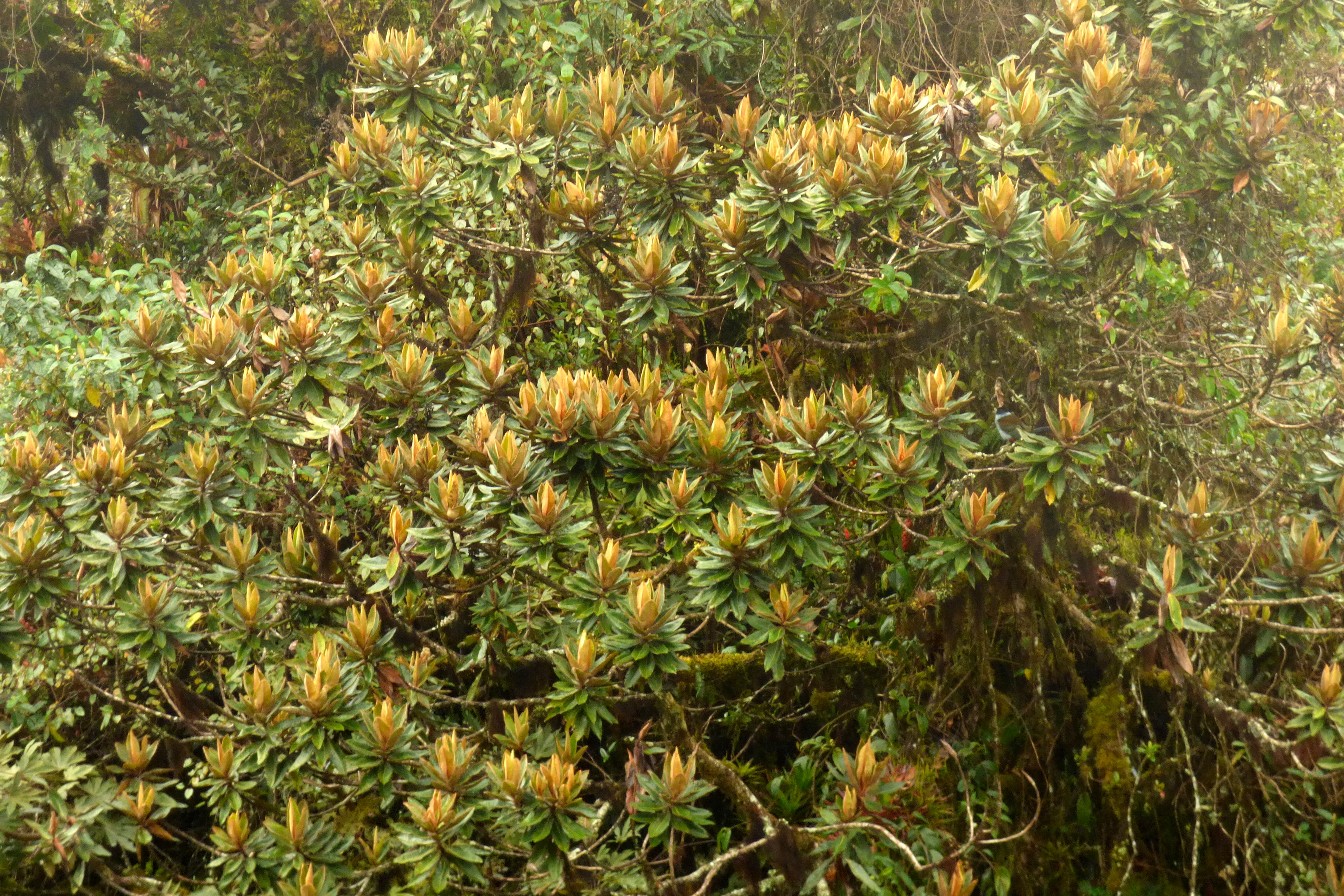 Laurel dorado - Amarillo (Ocotea sericea)